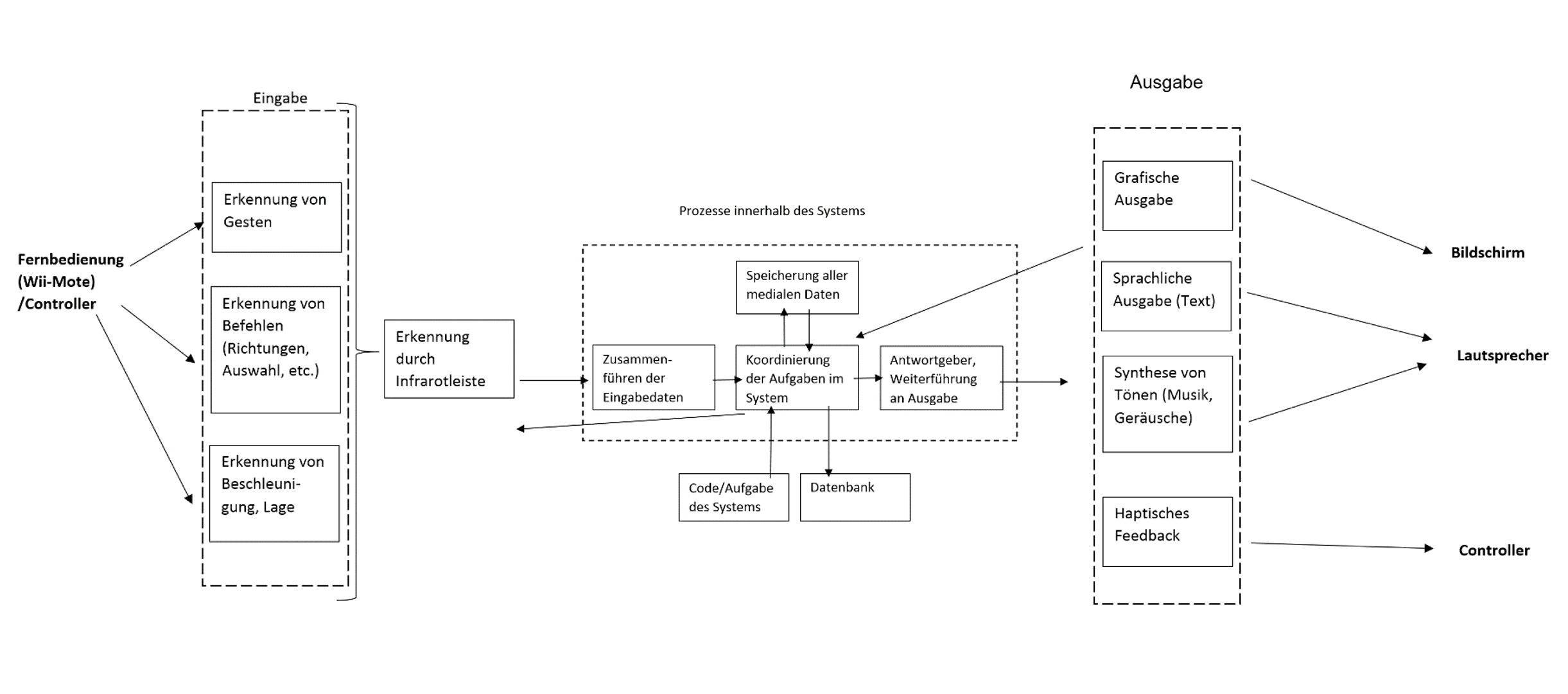 Multimodale Prozesse beim System WiiSports